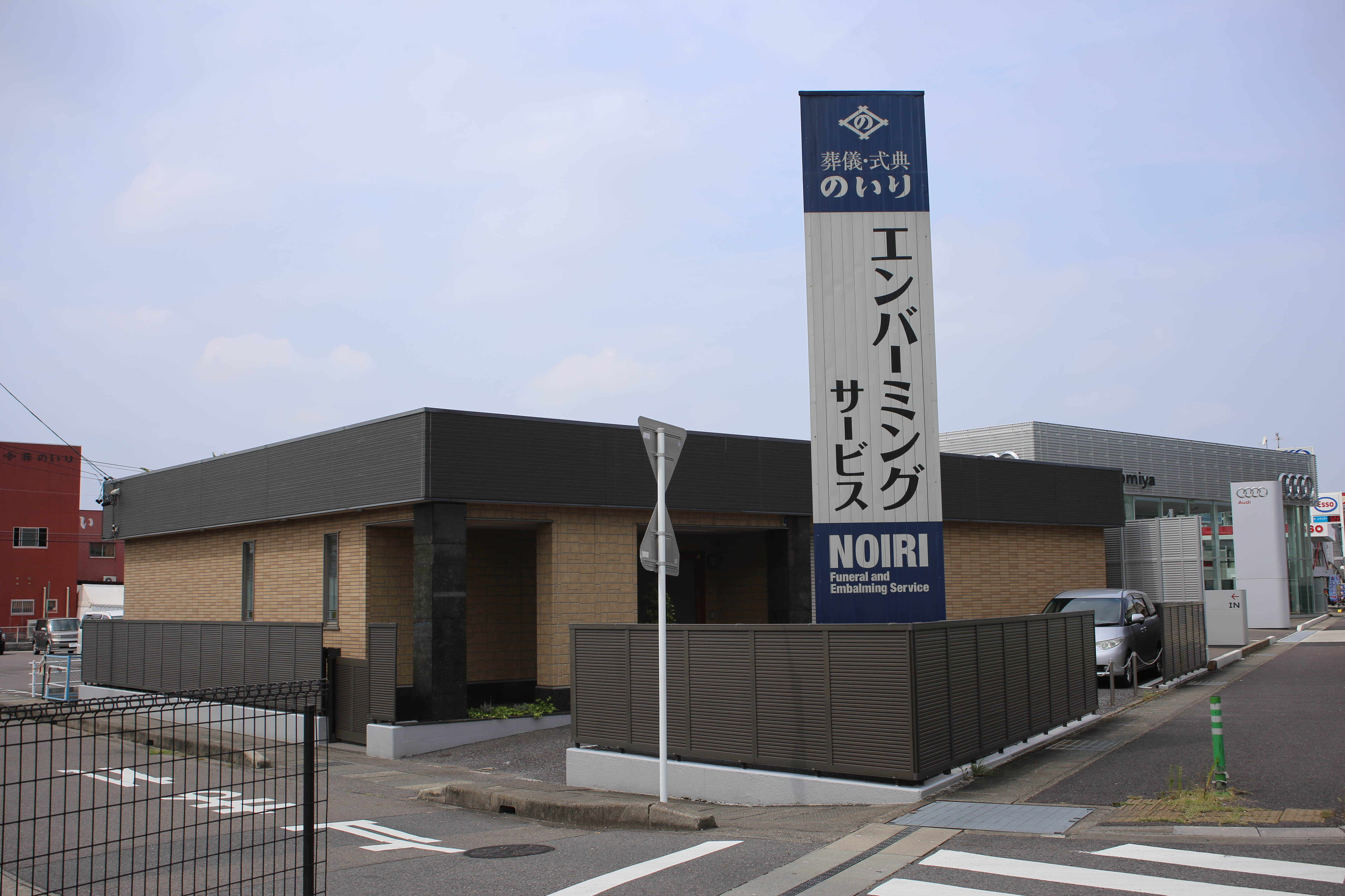 愛知県一宮市の「のいり」のエンバーミングサービス拠点を東側公道南側より撮影